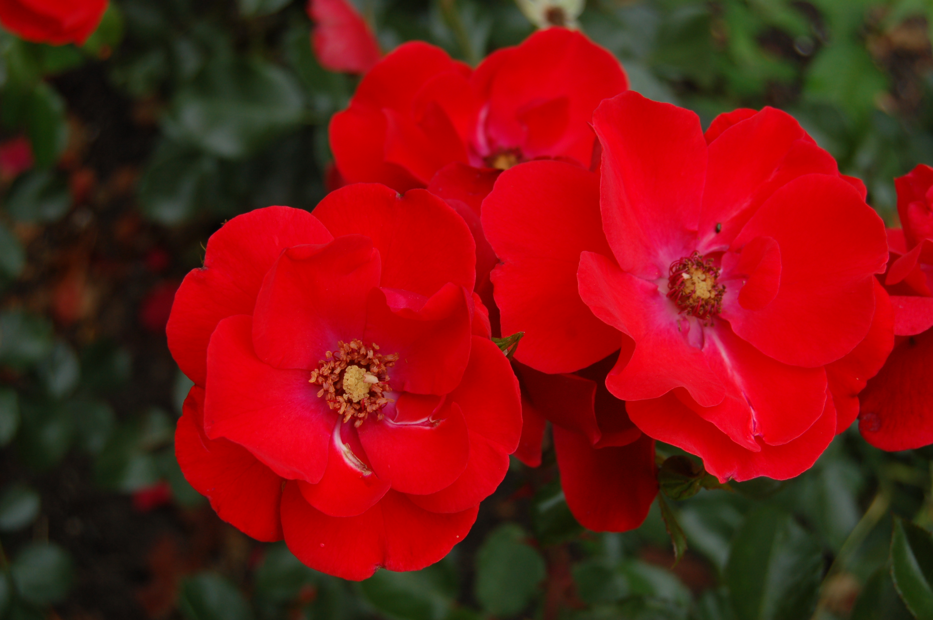 Rosa 'Paprika' (1958)